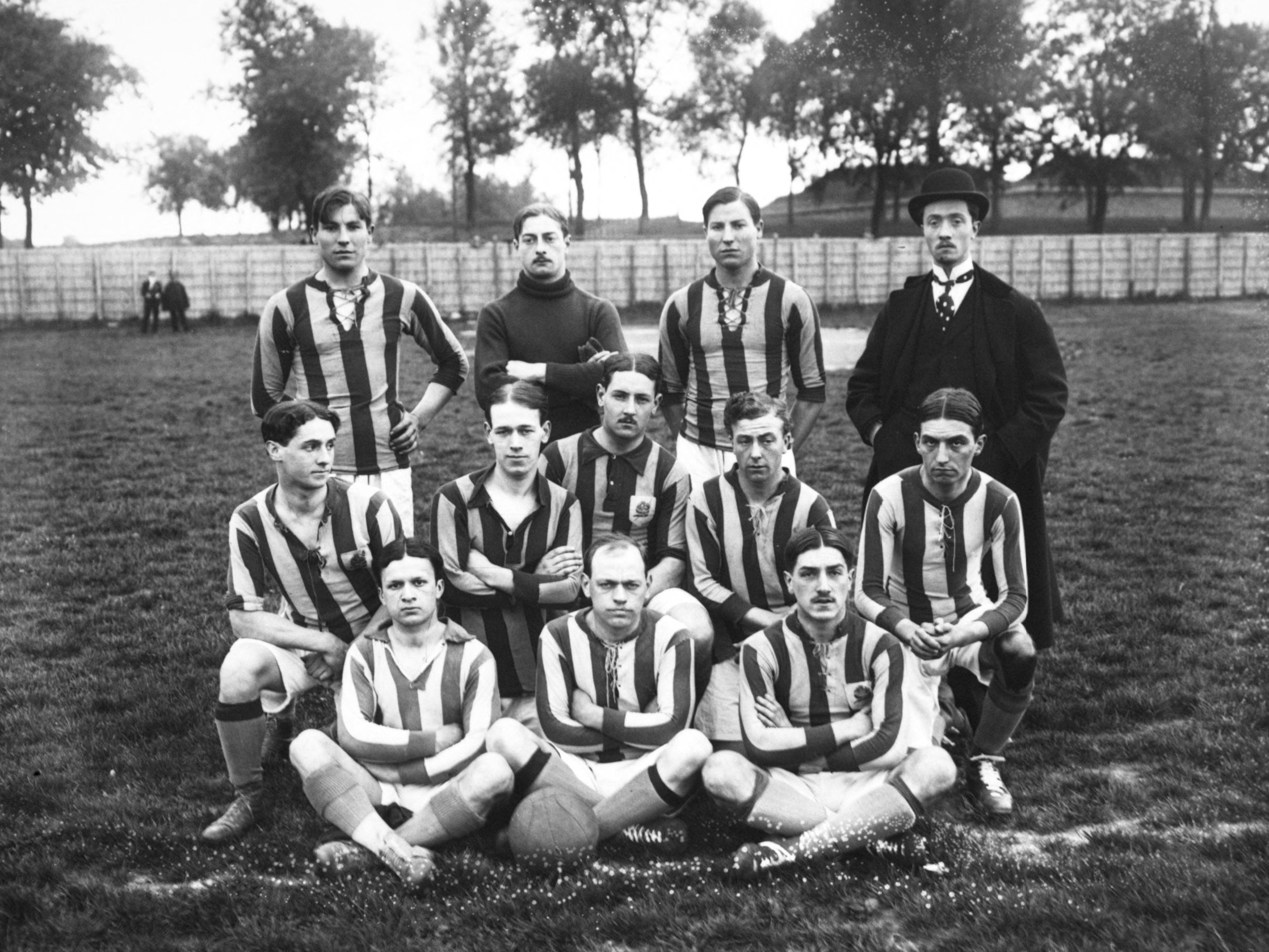 12-5-13, stade de la Vache-Noire - Equipe de la Vie au grand air du Médoc demi-finale du Trophée de France, football.